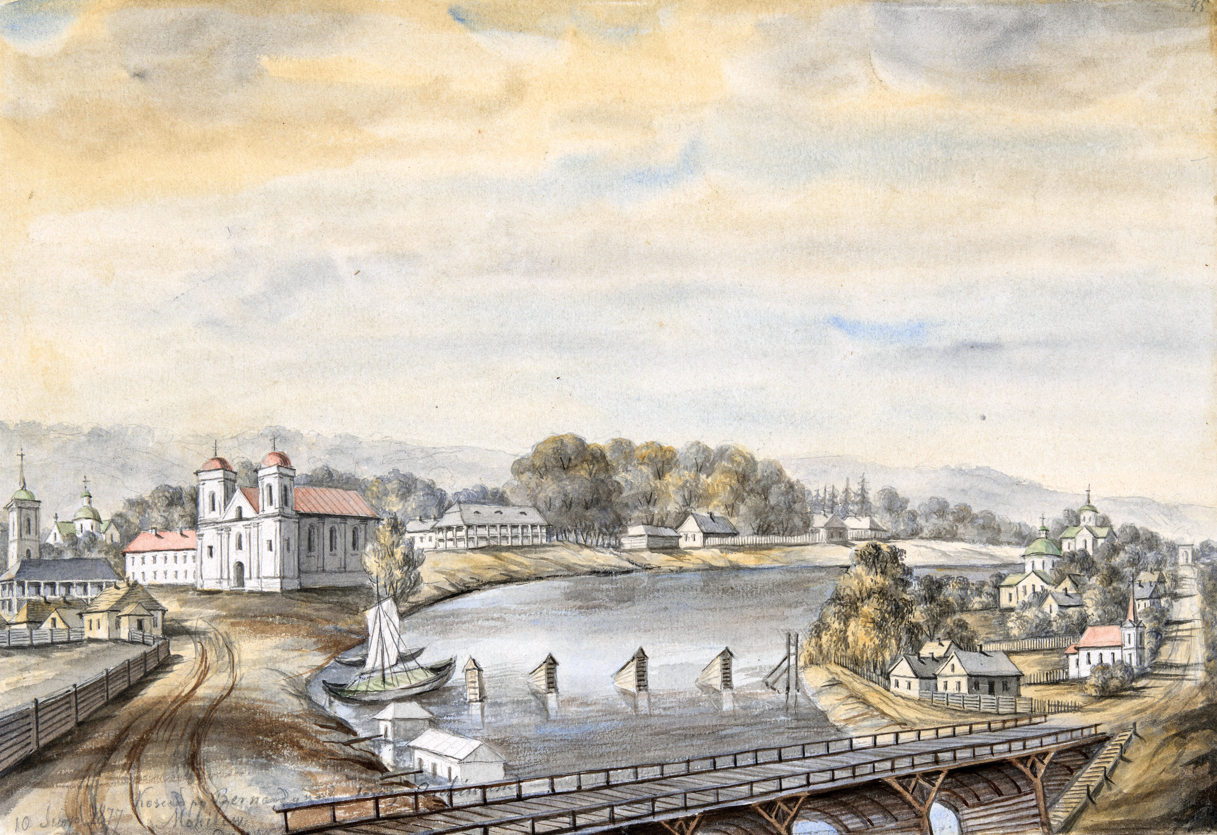 Беларуская (тарашкевіца): Магілёў (Mahiloŭ), рака Дняпро (Dniapro). Касьцёл Сьвятога Антонія Падуанскага і кляштар бэрнардынаў